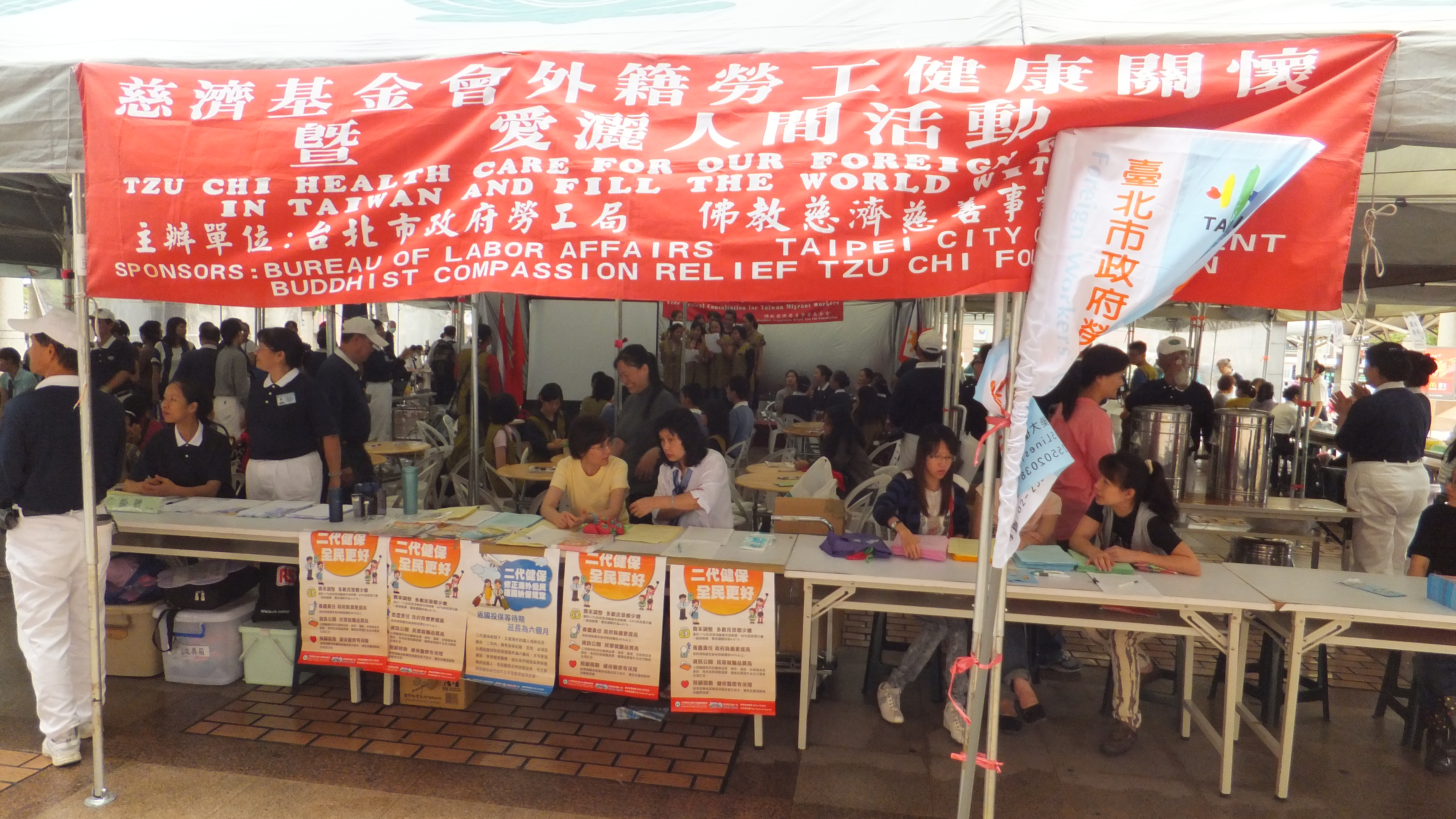 2011年10月9日，慈濟基金會與臺北市政府勞工局於臺北車站南口廣場舉辦的外籍勞工健康檢查活動。